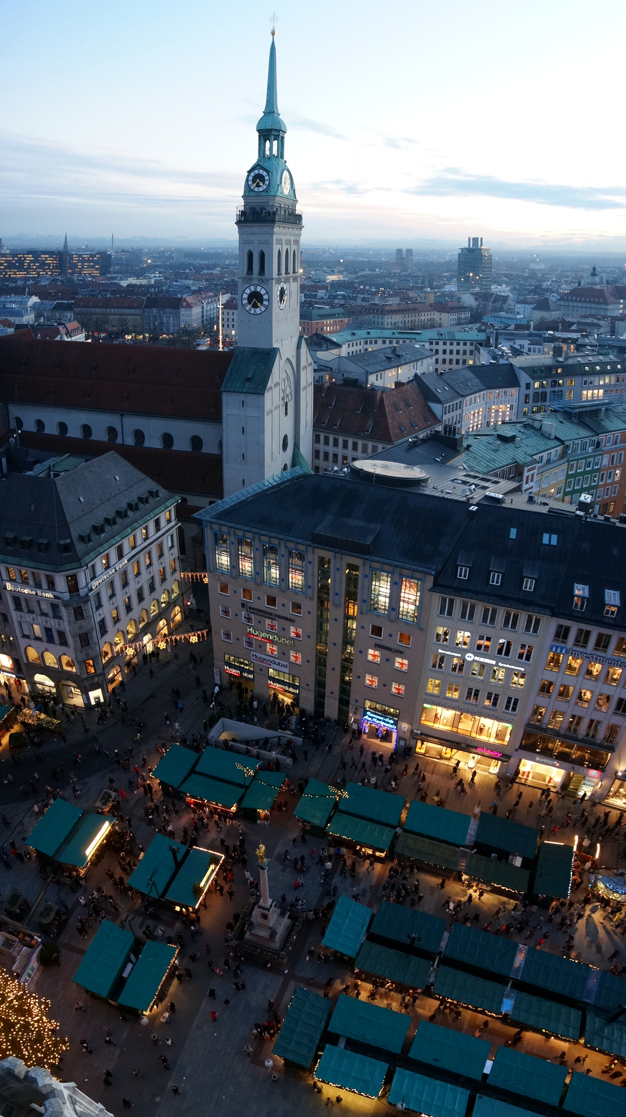 Deutschland, Bayern, Oberbayern, München, Alter Peter, Christkindlmarkt